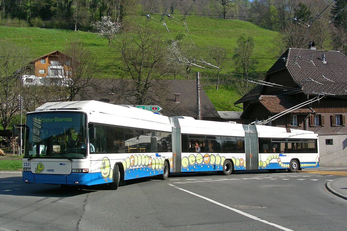 Der Doppelgelenktrolleybus Nr. 233 der vbl bei der Station Stampfeli in Kriens. Damals noch als "Tatzelwurm", einer Eigenwerbung für die Doppelgelenkbusse in Luzern.